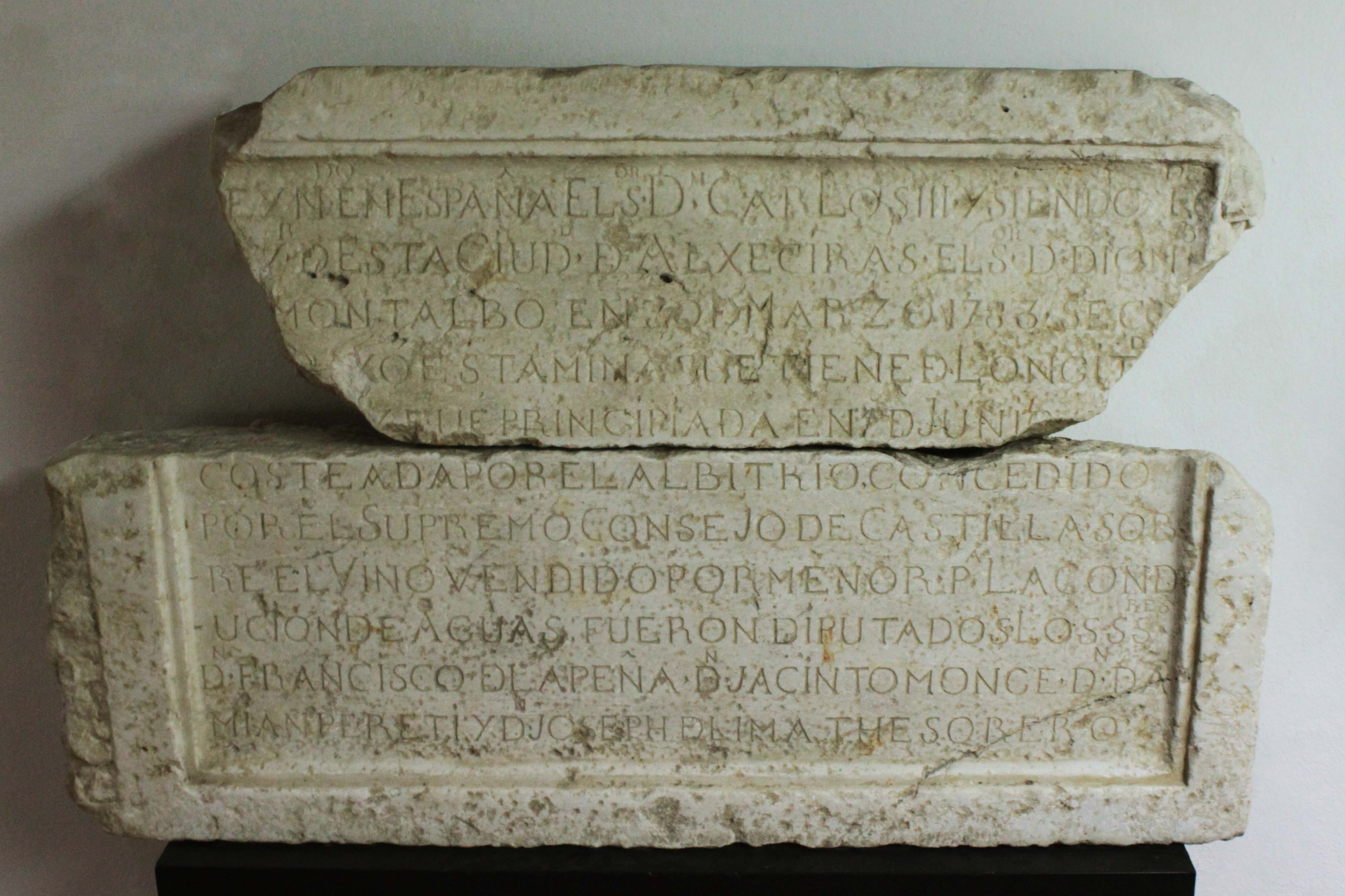 Lápida conmemorativa de la construcción del Acueducto de Algeciras y de la Fuente Nueva de la ciudad. Depositada en el Museo municipal de Algeciras, Andalucía, España. En el texto se lee: «(Re)YNDO EN ESPAÑA EL SOR DN CARLOS III Y SIENDO (alcalde ma)YR DESTA CIUDD DE ALXECIRAS EL SOR DN DION (isio) MONTALVO, EL 30 Đ MARZO Đ 1783 SE CO (nstru)YÓ ESTA MINA QUE TIENE Đ LONGITD (DCC) Y FUE PRINCIPIADA EN 11 DE JUNIO (de 1777 y) COSTEADA POR EL ARBITRIO CONCEDIDO POR EL SUPREMO CONSEJO DE CASTILLA SOB RE EL VINO VENDIDO POR MENOR PA LA COND UCIÓN DE AGUAS. FUERON DIPUTADOS LOS SS DN FRANCISCO Đ LA PEÑA, DN JACINTO MONGE, DN DA MIAN PERETI Y DN JOSEPH DE LIMA THESORERO». («Reinando en España el señor Don Carlos III y siendo alcalde mayor de esta ciudad de Algeciras el señor Don Dionisio Montalvo, el 30 de marzo de 1783 se contruyó esta mina que tiene de longitud DCC y fue principiada el 11 de junio de 1777 y costeada por el arbitrio concedido por el Supremo consejo de Castilla sobre el vino vendido al por menor para la conducción de aguas. Fueron los señores Don Francisco de la Peña, Don Jacinto Monge, Don Damián Pereti y Don Joseph de Lima tesorero.»)